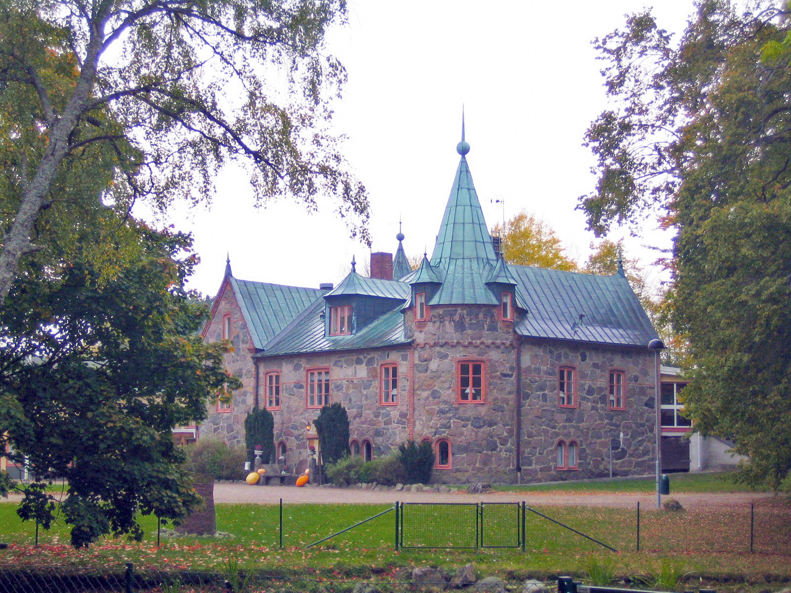 Vannaröds slott. Bilden tagen av mig själv 9 oktober 2005.